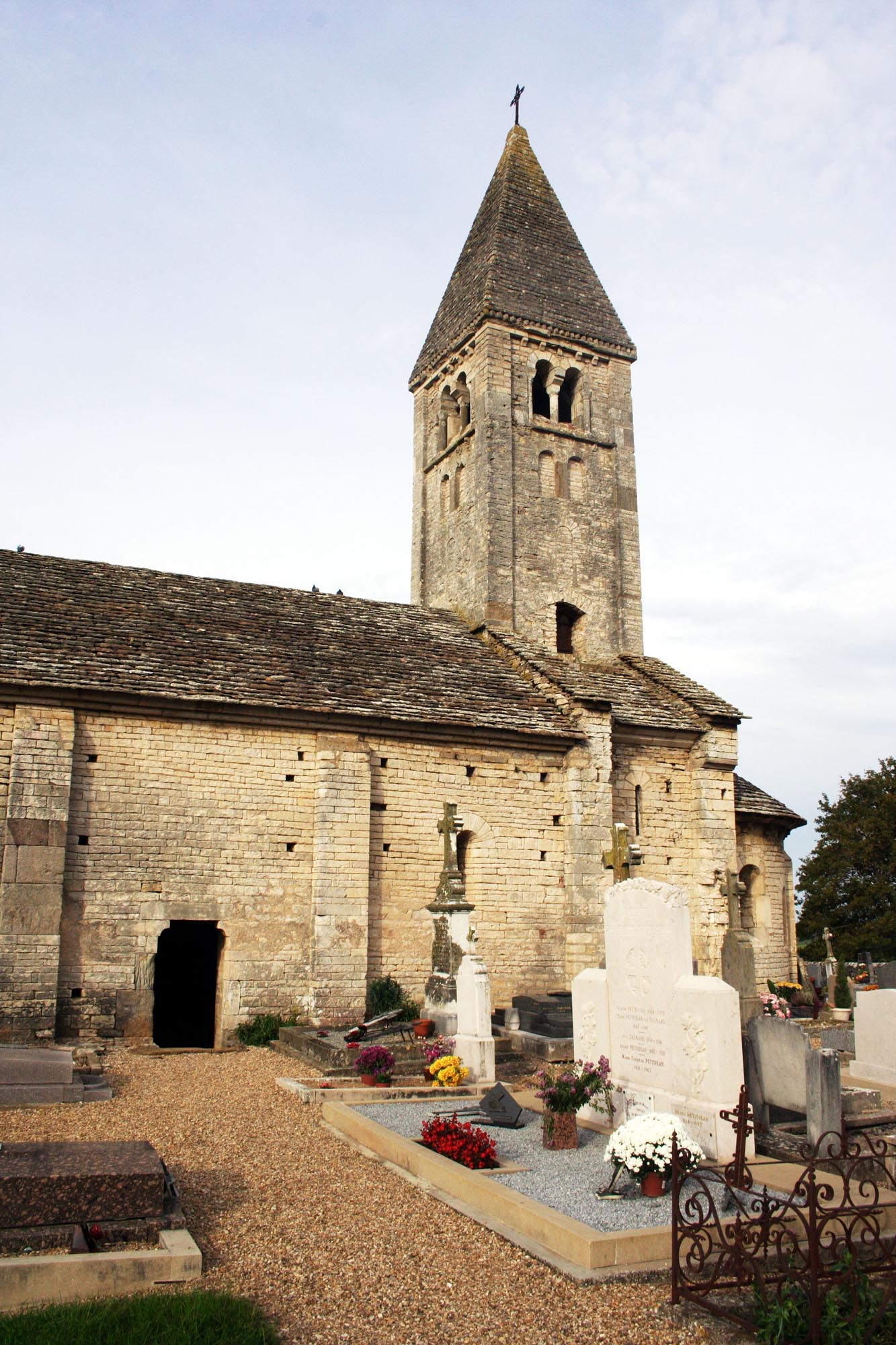 Église romane d'Ougy, à Malay, Saône et Loire, Bourgogne, France